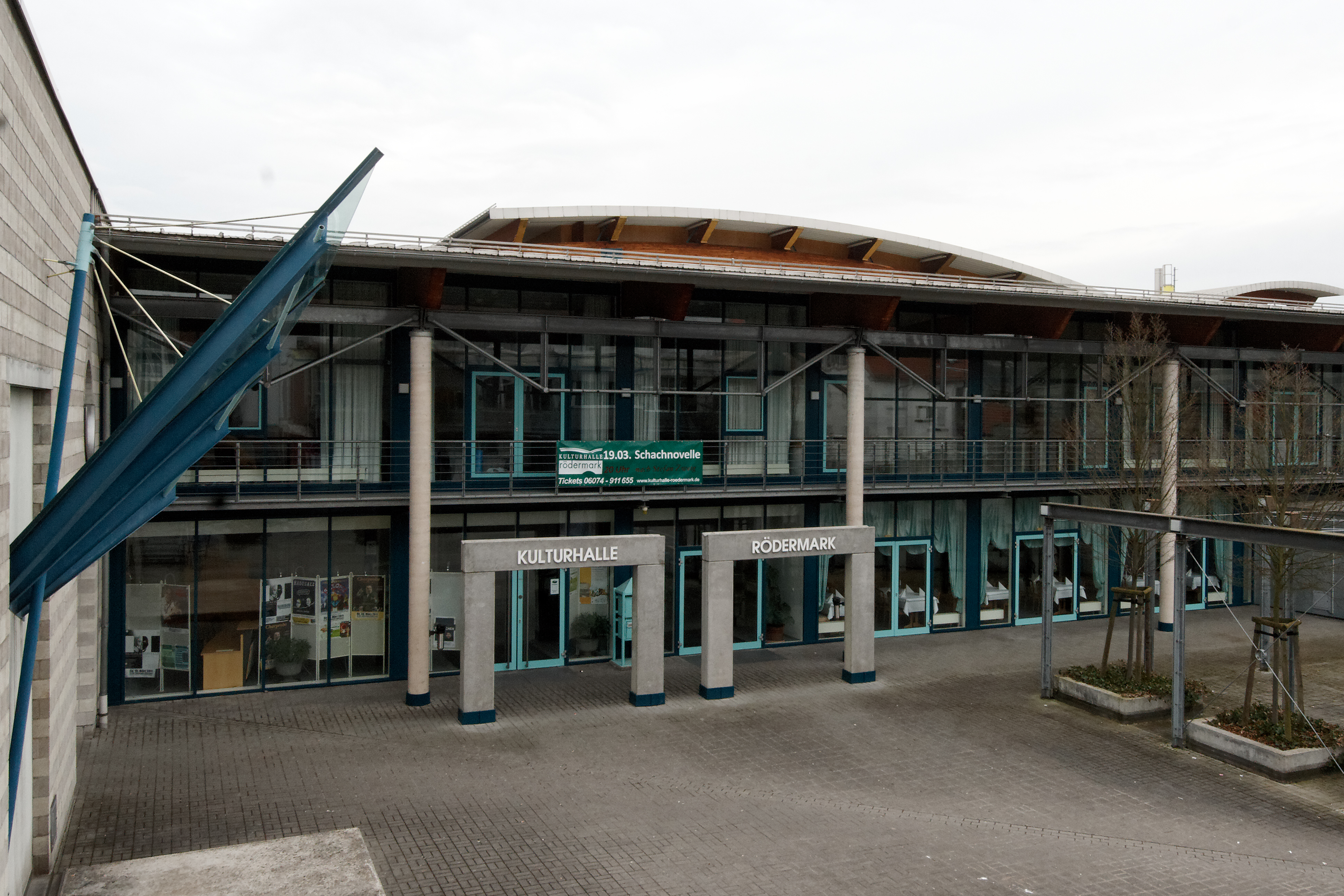 Kulturhalle in Ober-Roden (Stadt Rödermark), eingeweiht 1995.